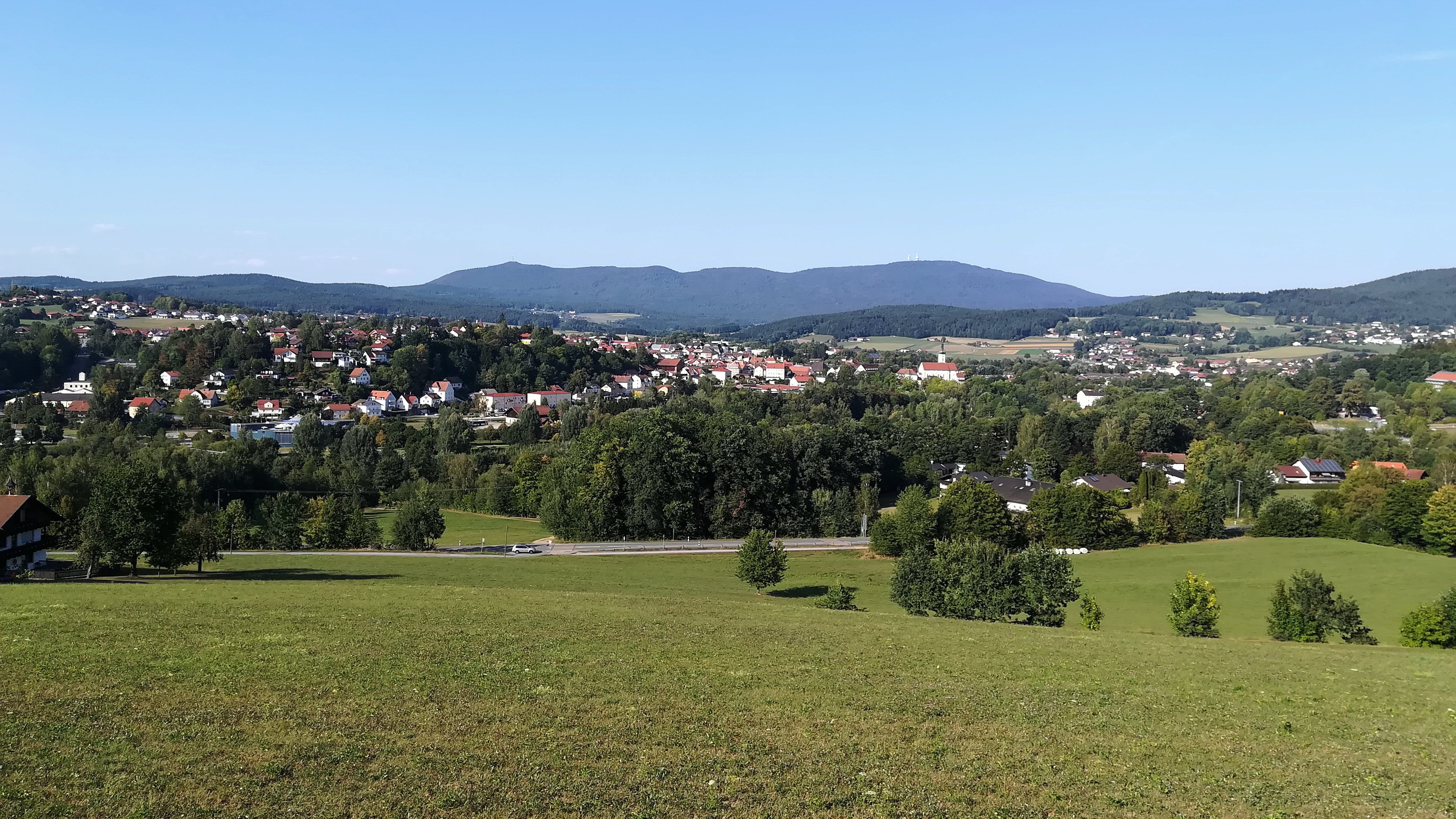 Bad Kötzting (bis 2005: Kötzting) ist eine Stadt im Oberpfälzer Landkreis Cham in Ostbayern und seit Dezember 2005 ein staatlich anerkanntes Kneippheilbad.